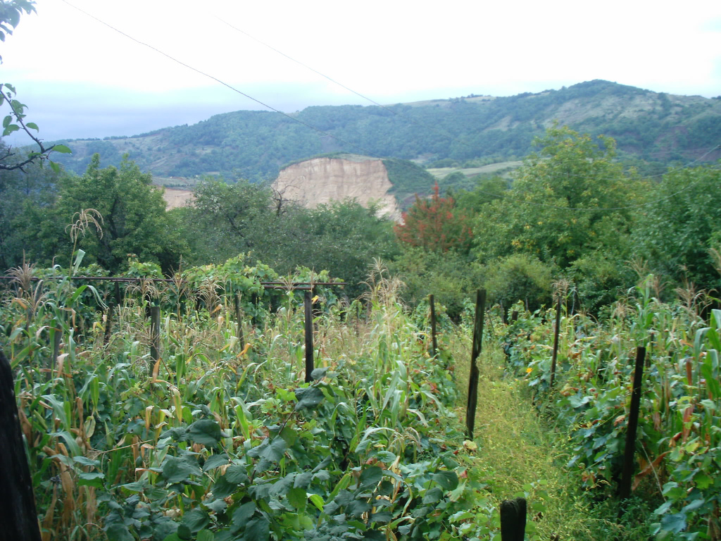 Sachkhere (Georgia) September 2003 (auf Deutsch; in German) en español